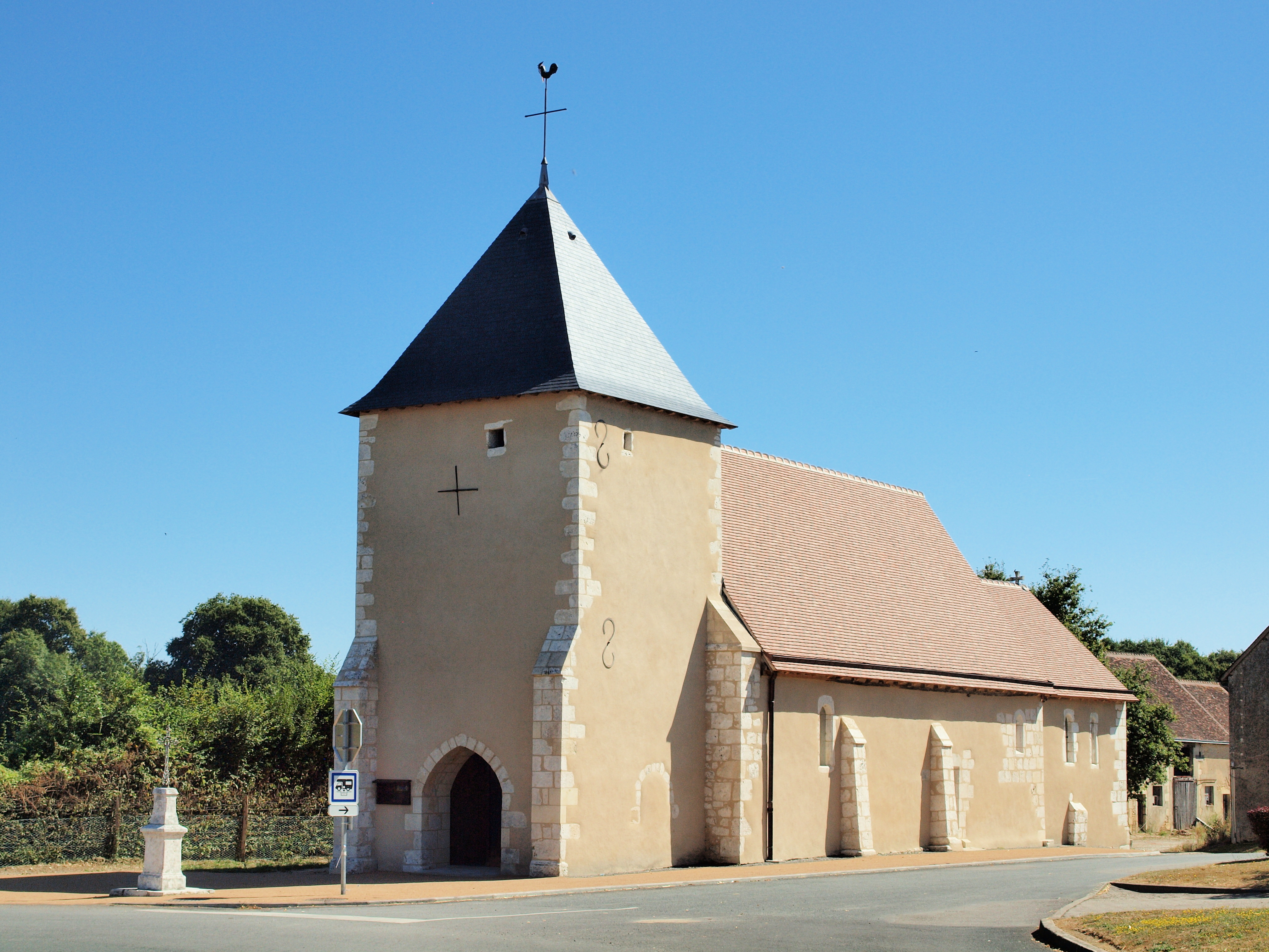 Église Saint-Martin de La Pérouille (Indre, France)